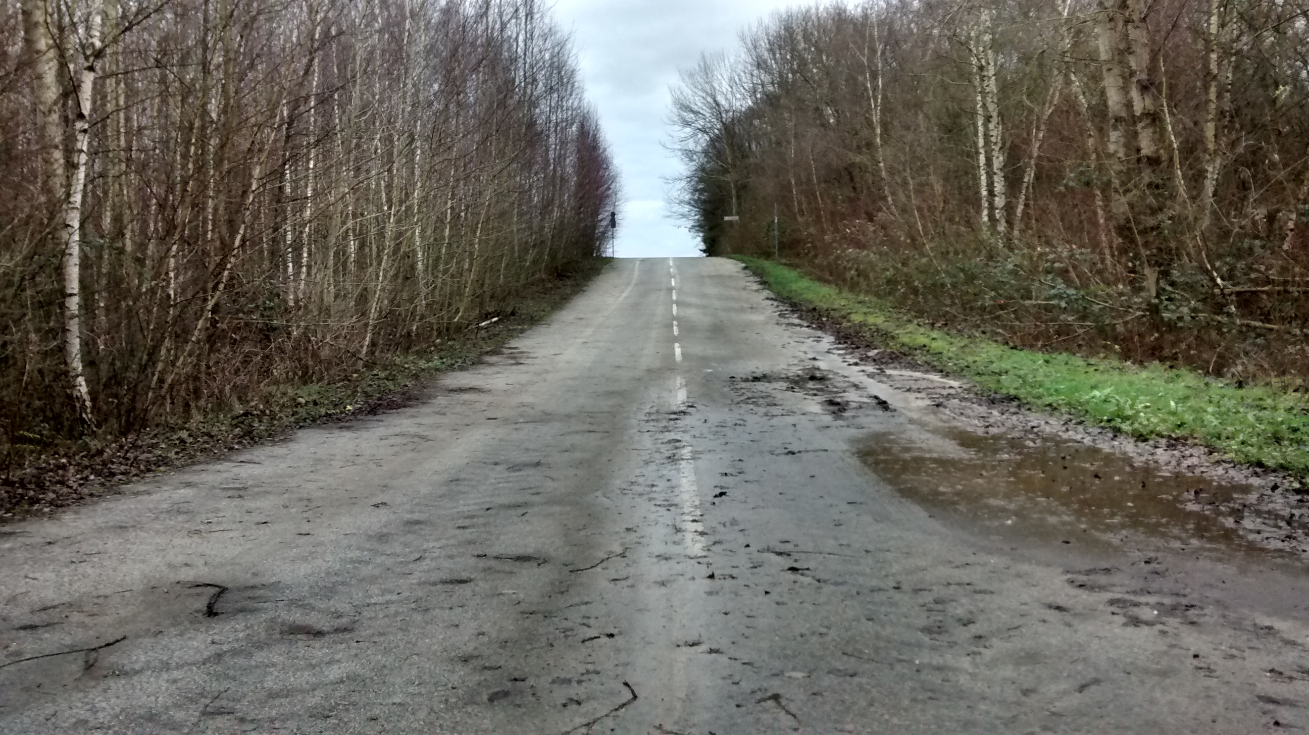 Impressionen aus der südöstlichen Umgebung des Blausteinsees und des Naherholungsgebiets Dürwiß vom Dezember 2014.